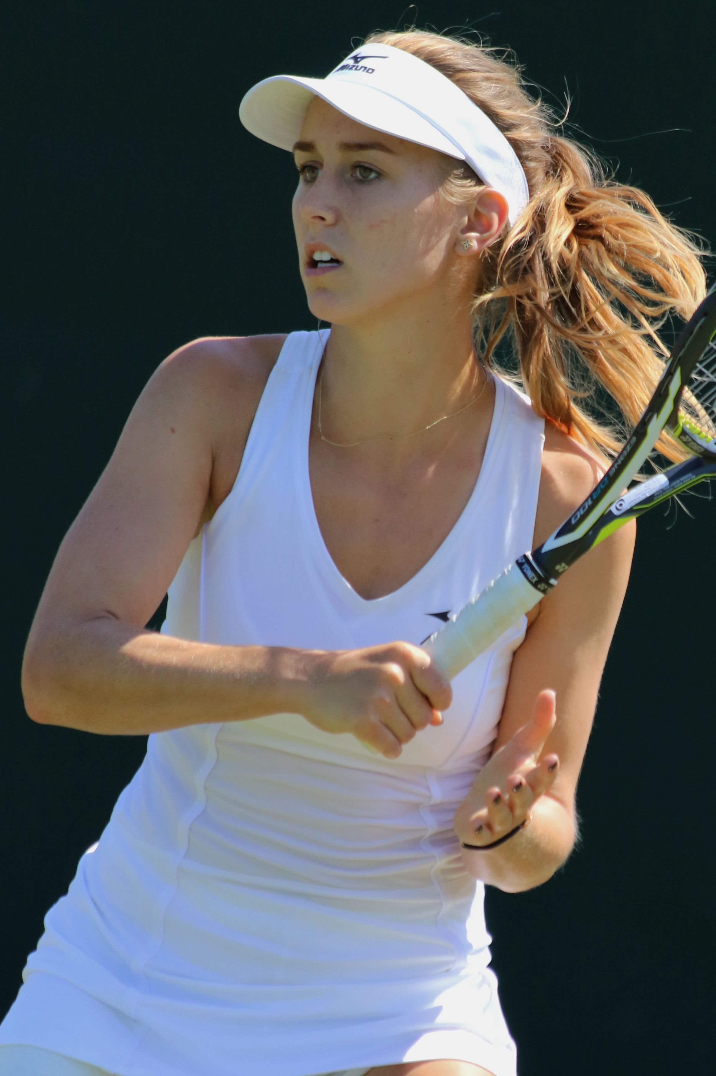 Stefkova WMQ18 (16)